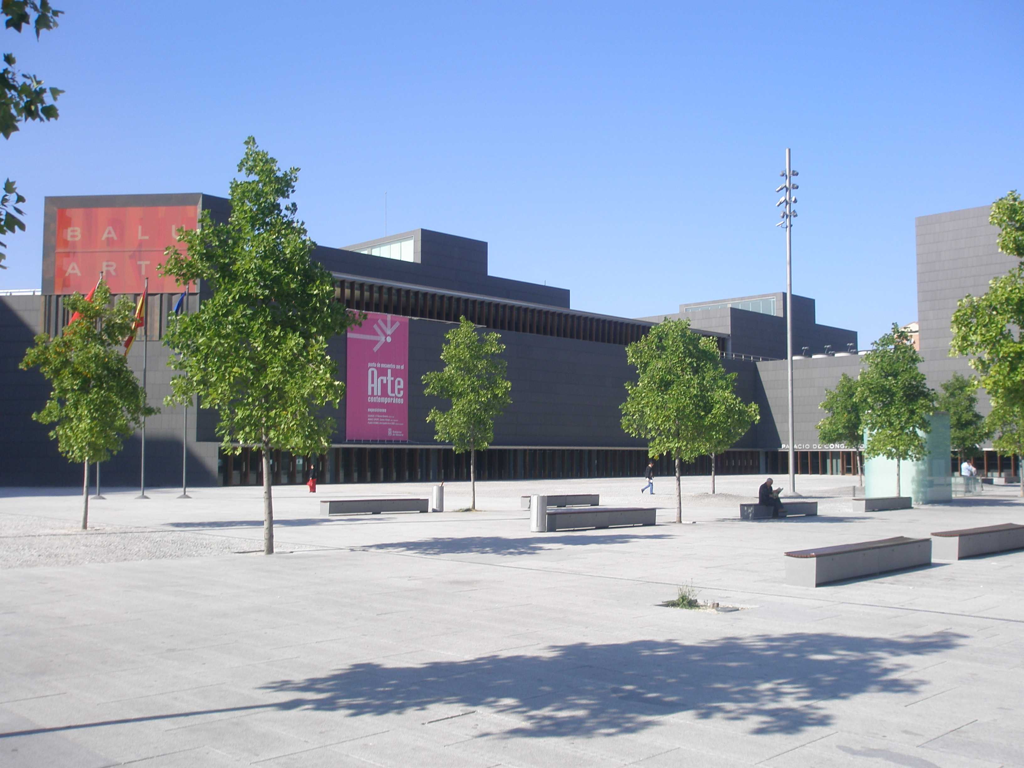 Baluarte. Palacio de Congresos de Pamplona, en el Primer Ensanche.